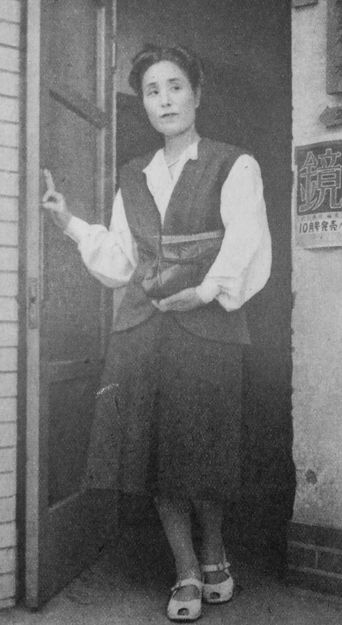 真杉静枝